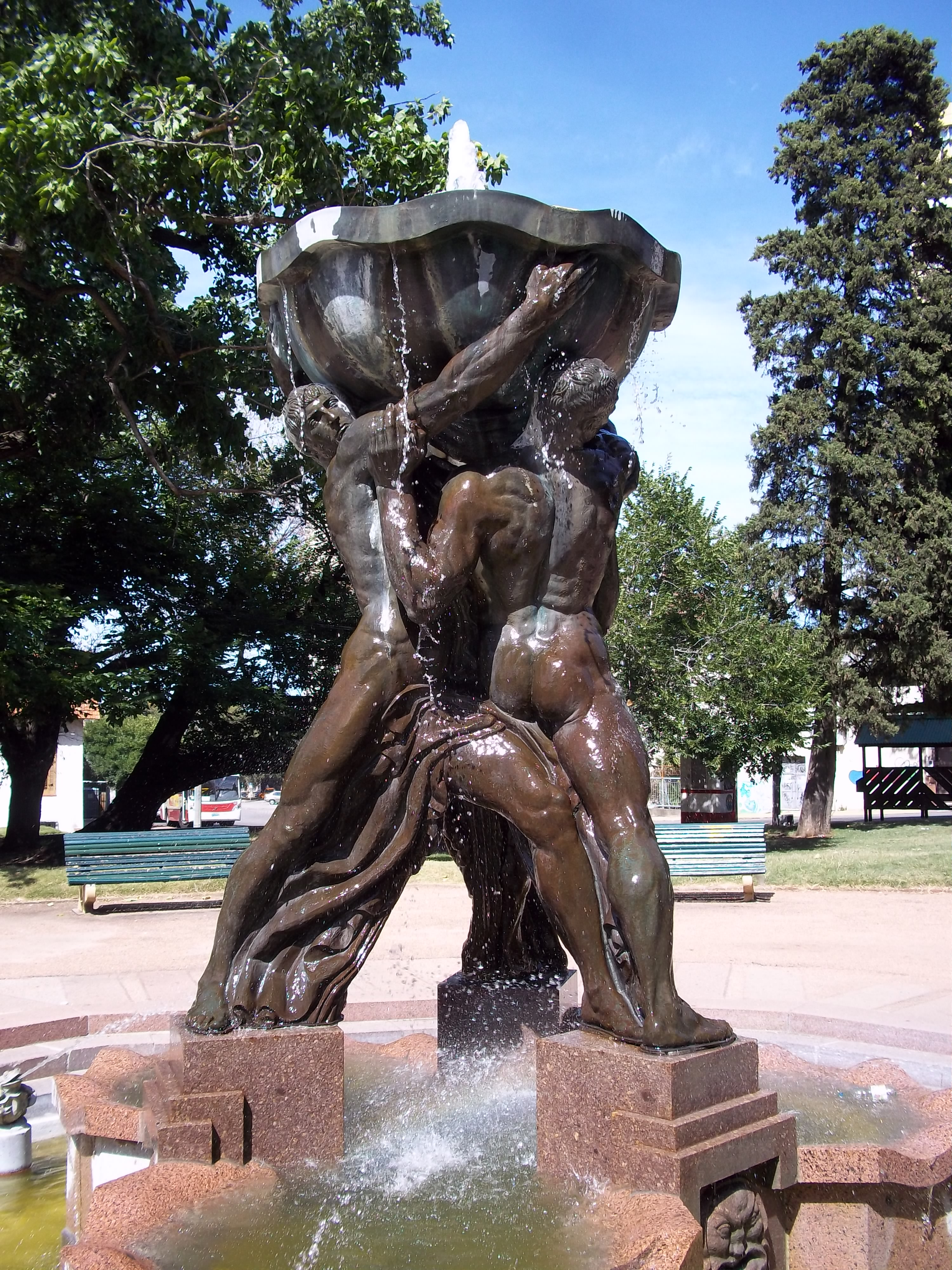 Fuente de los Atletas, creada en 1927 por José Luis Zorrilla de San Martín